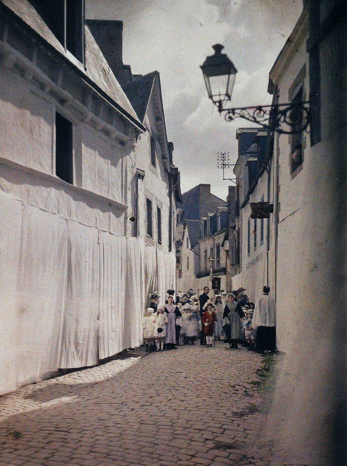 Albert Kahn : La procession de la Fête-Dieu à Auray le 13 juin 1920 (plaque autochrome, Musée Albert Kahn, Bpulogne-Billancourt)